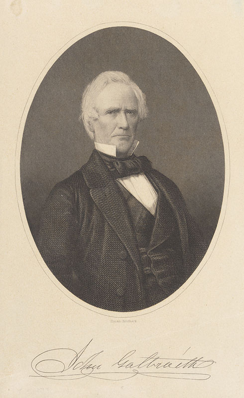 John Galbraith (1794-1863)